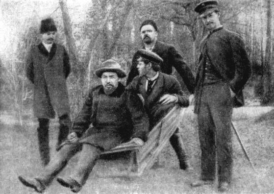 В Мелихове. В тачке - А. П. Чехов и М. П. Чехов. Везет тачку В. А. Гиляровский. Стоят: слева - А. А. Долженко, справа - И. П. Чехов. // Чехов М. П. Вокруг Чехова. Встречи и впечатления. М.: Московский рабочий, 1960. — 352 с. — 75 000 экз.